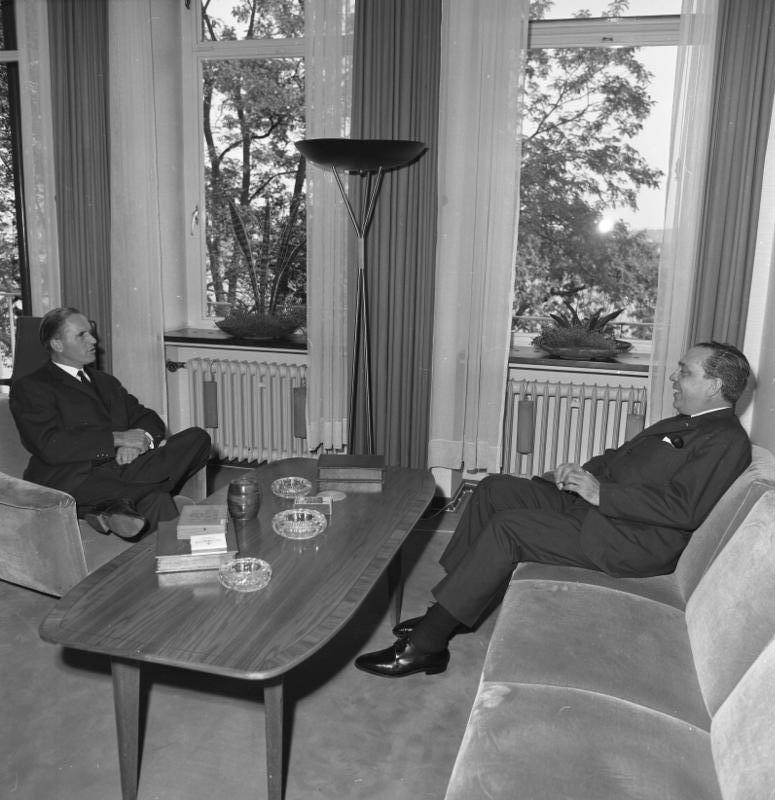 Staatssekretär Carstens empfängt Senator Gerardo M. Roxas, Vicepräsident der Liberalen Partei der Philippinen